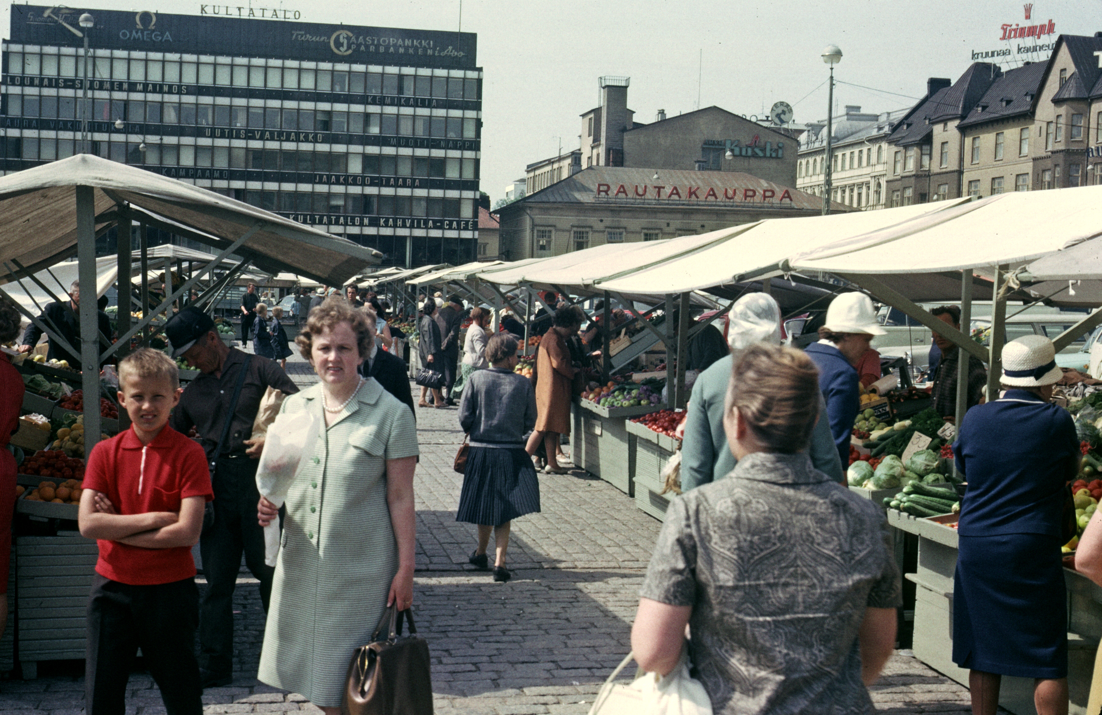 market place turku